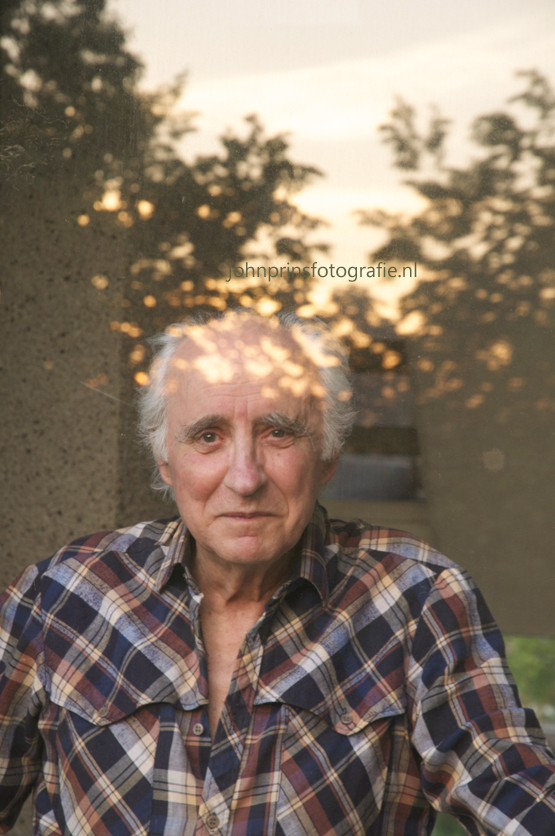 Enric (Enrique) Raxach (Barcelona, 15 januari 1932) is een Nederlands componist van Spaanse herkomst.